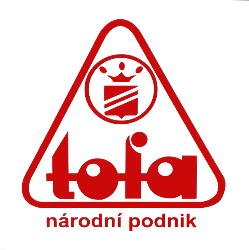 Škoda 1202 STW - služební vozidlo n.p. TOFA (dnes DETOA Albrechtice s.r.o.)